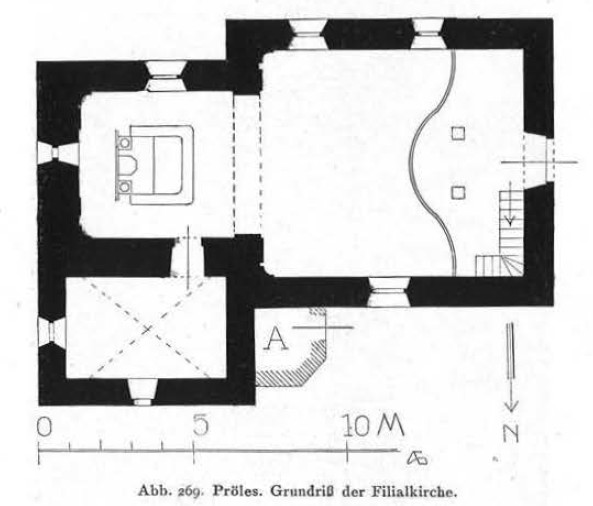 Abb. 269. Pröles. Grundriss der Filialkirche.